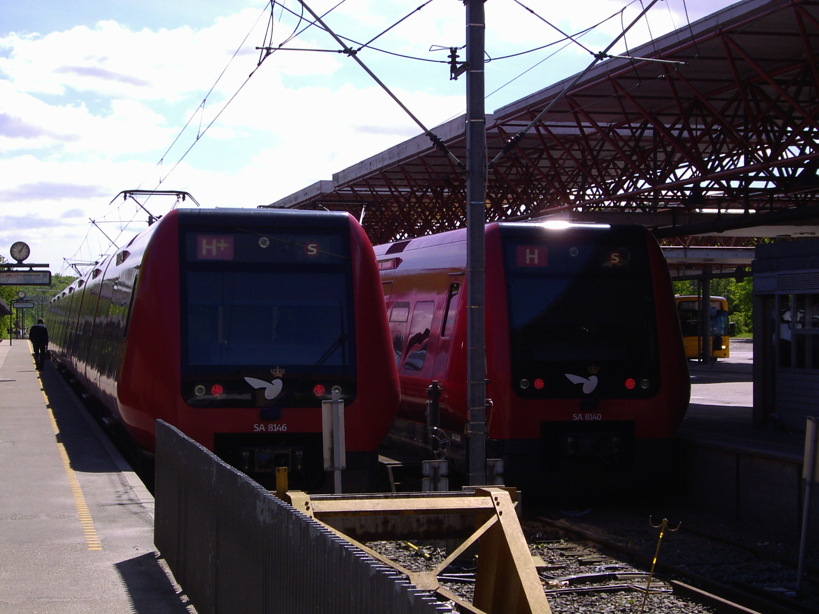 Farum Station er endestation for linje H+, der som her normalt holder i spor 1, og linje H, som holder i spor 2.